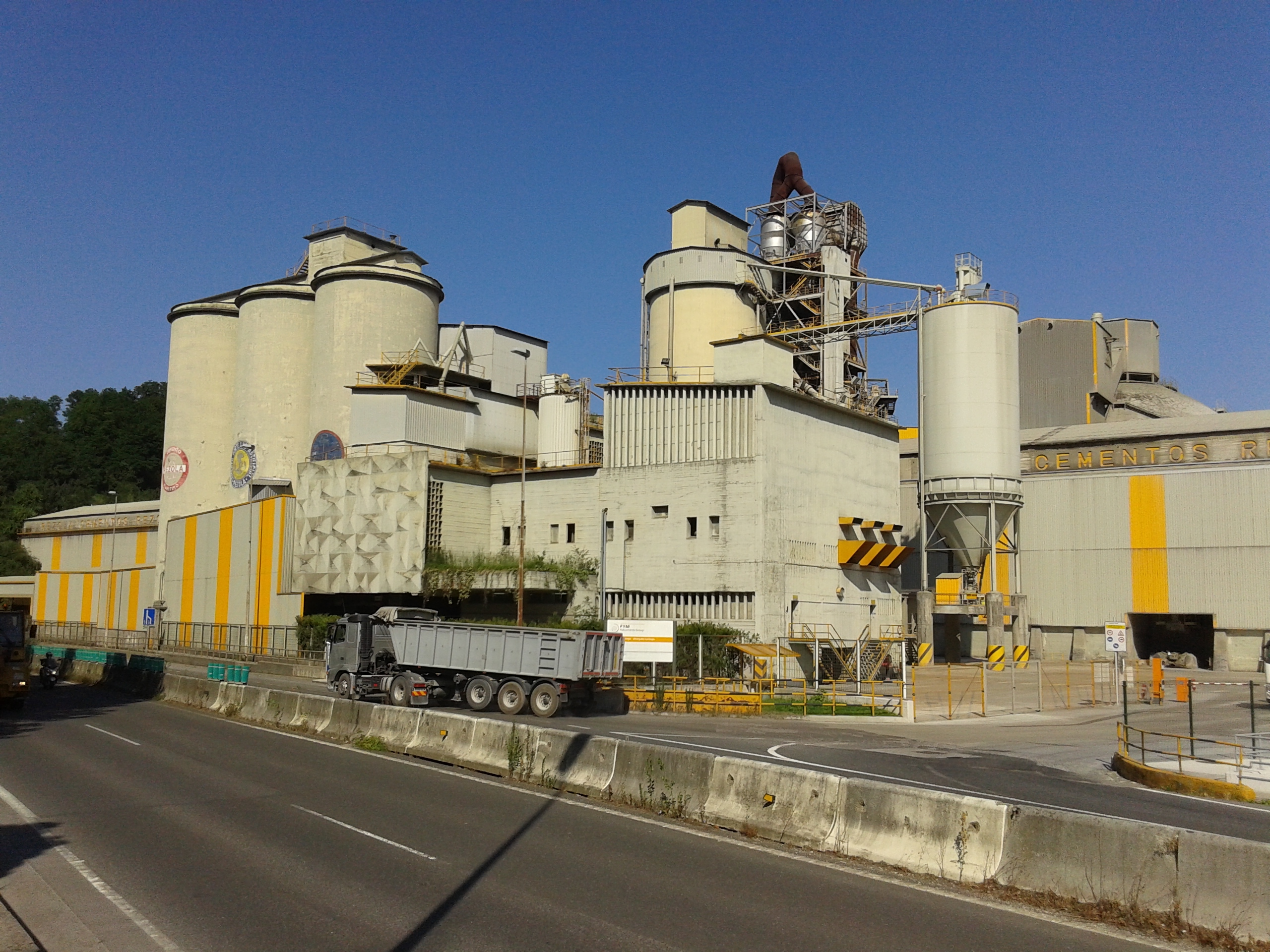 Rezola zementu lantegia Donostian.